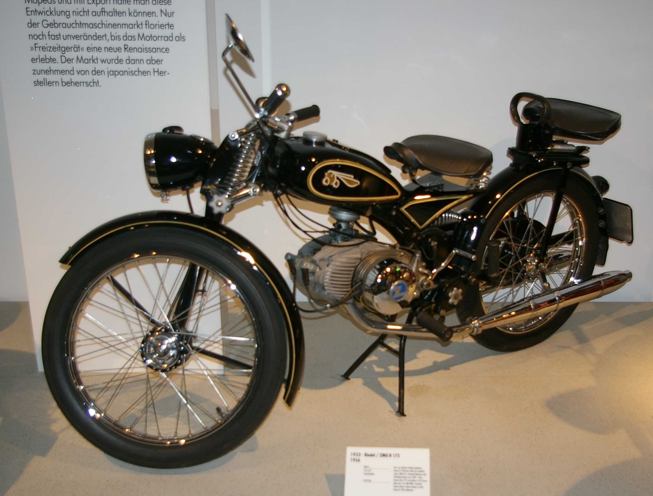 Imme 175, Bj. 1953-1956. Museum Neckarsulm